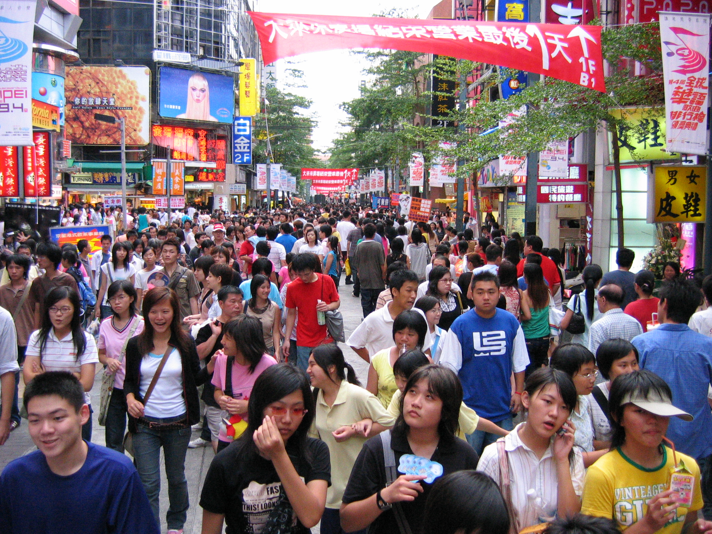 臺北市西門町，攝於2004年9月4日，以Canon A80拍攝。